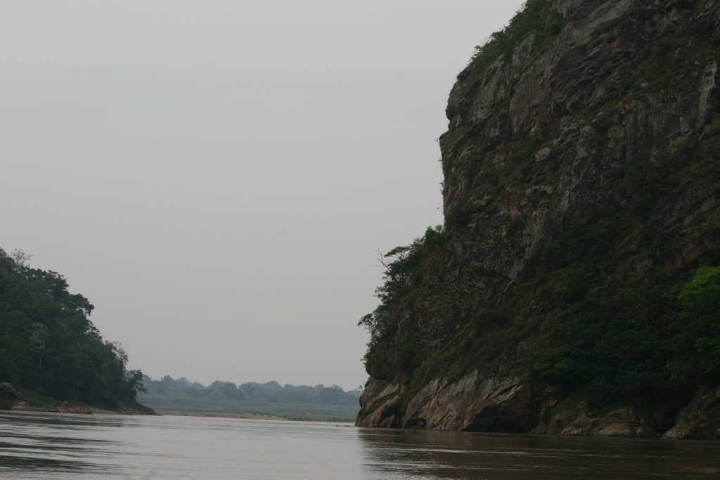 Gorges du diable, BeniRiver,Bolivie